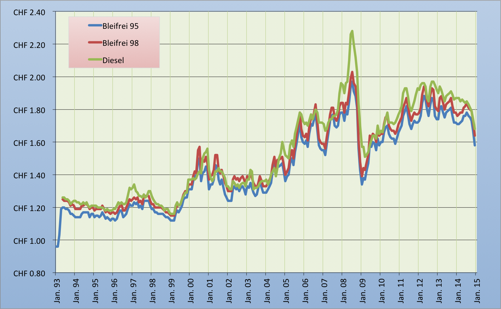 Benzinpreis 1994-2010